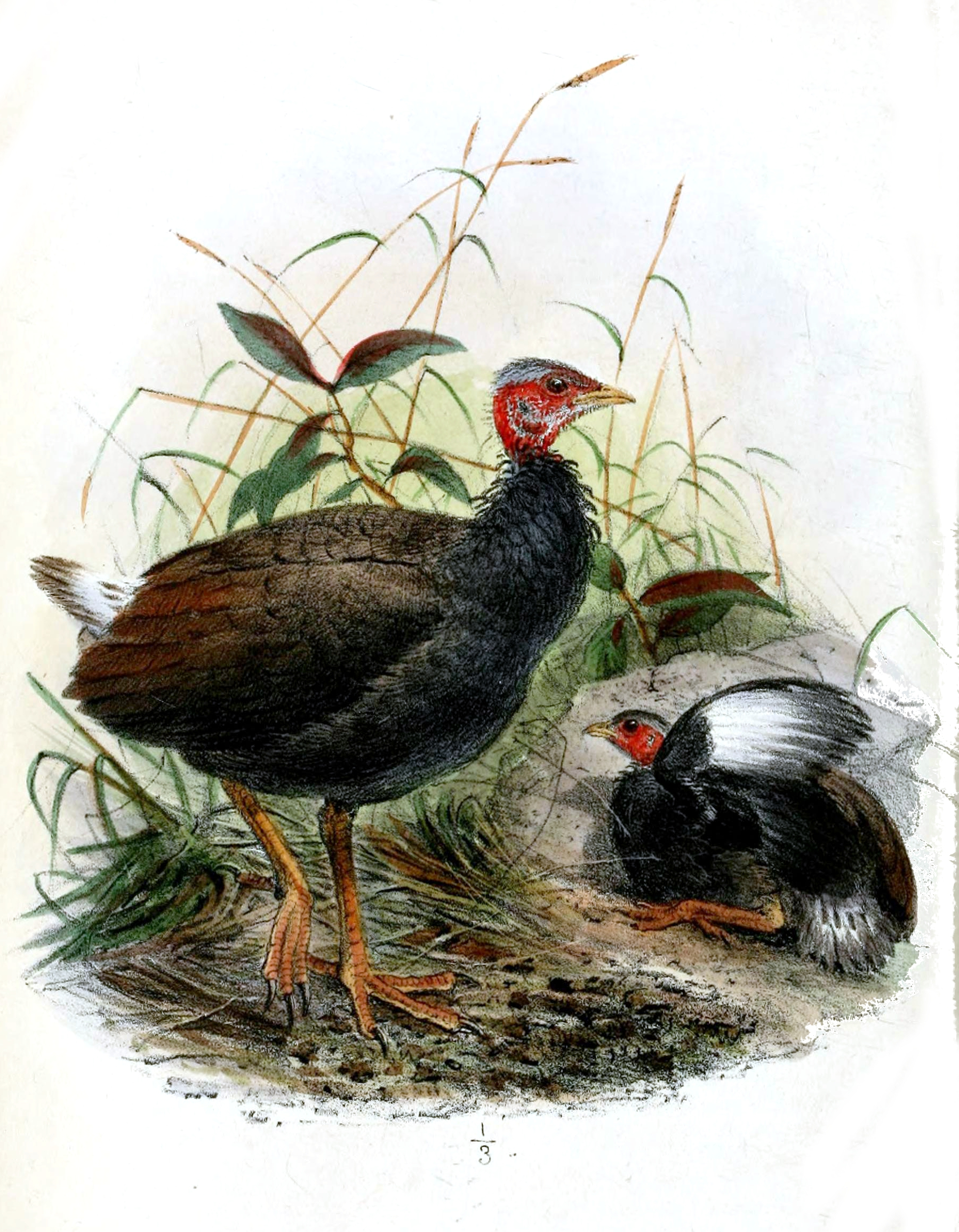 Megapodius pritchardii